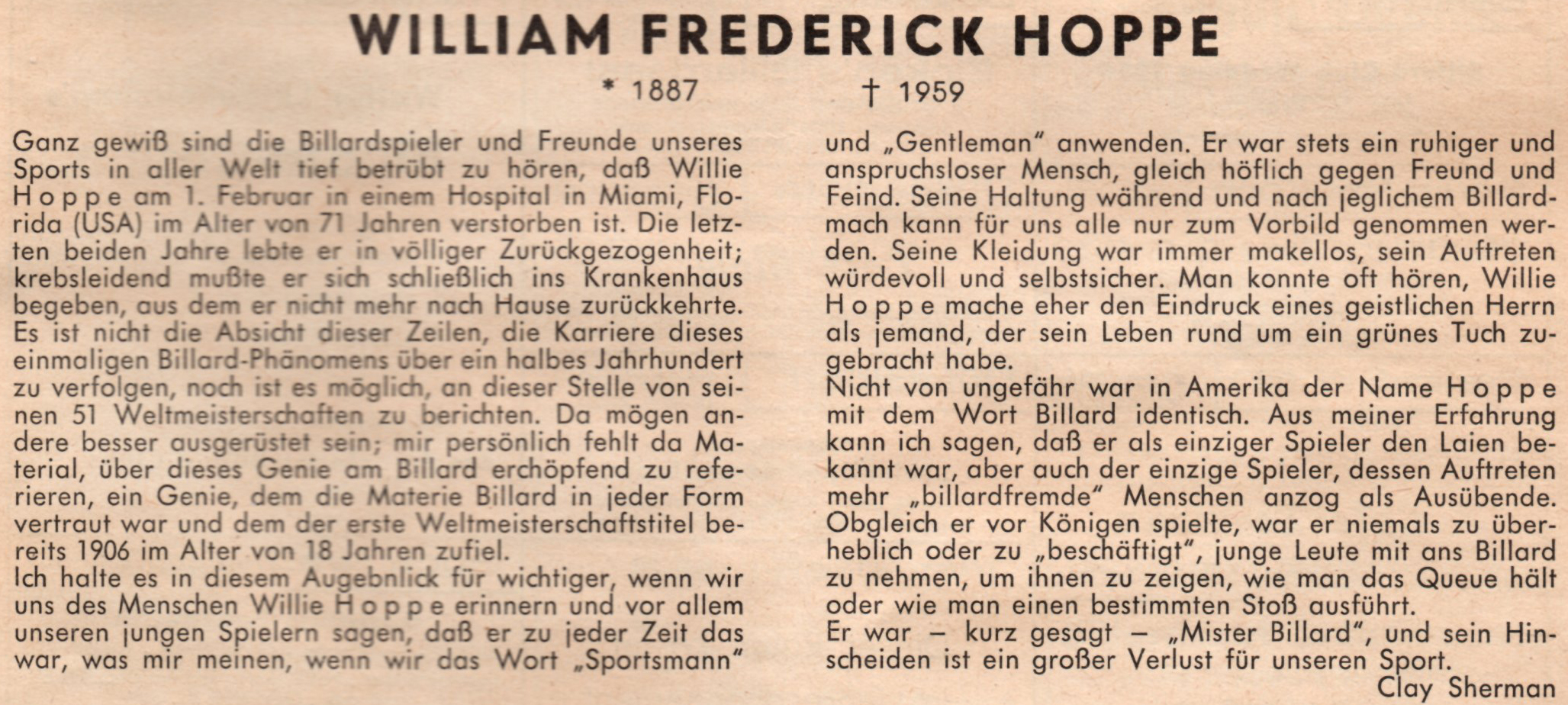 see file name